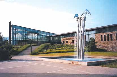 La cité de l'eau.jpg